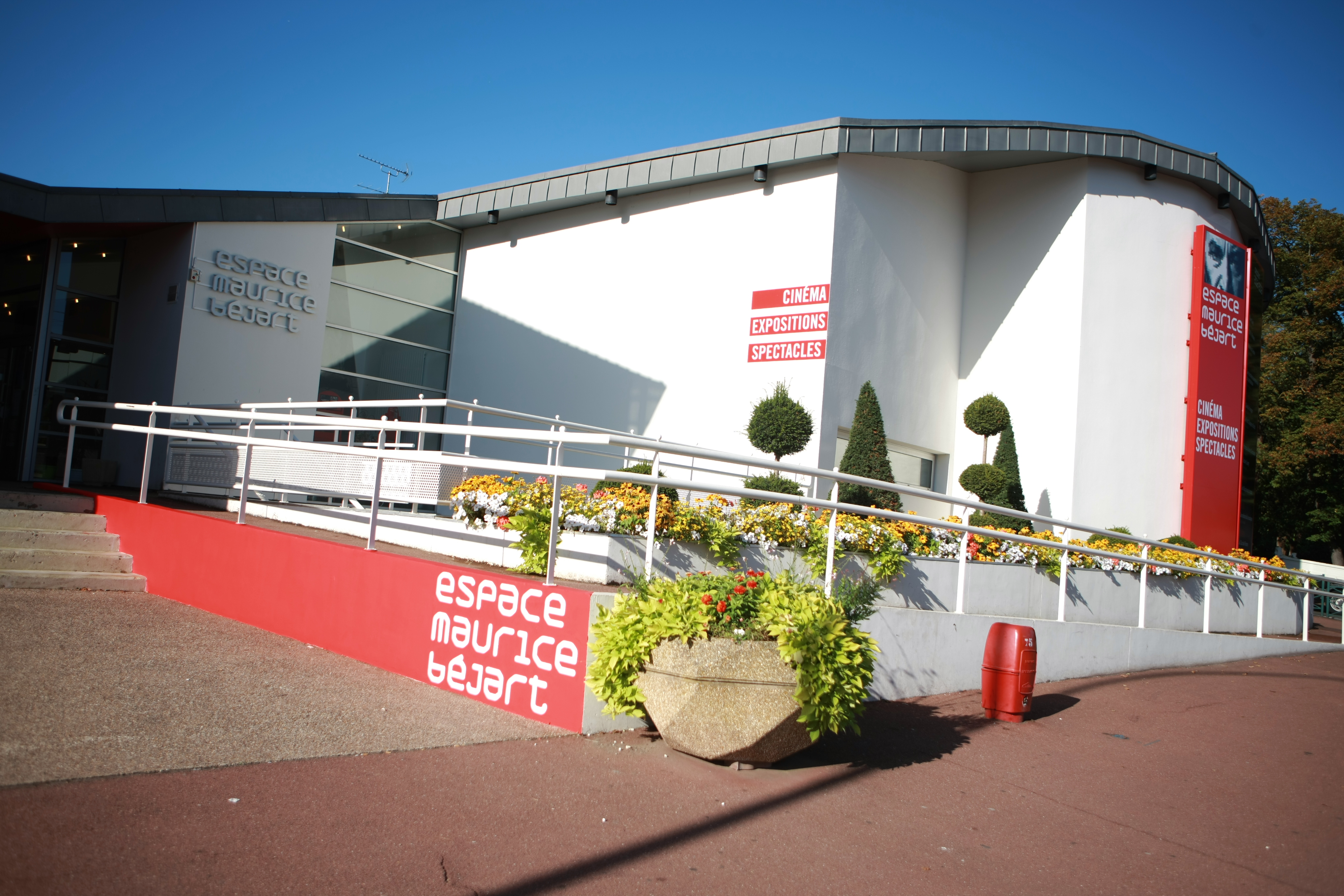 Cinéma, expositions, pièces de théâtre, spectacles....